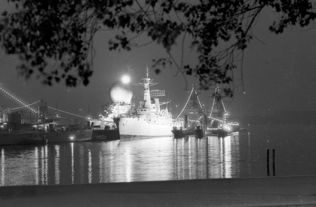 Nachtaufnahme. Diesseits der Mole die Fregatte AJAX (F 114, brit), das U-Boot WALRUS (S 08, brit.), das U-Boot OTUS (S 18, brit.) und das U-Boot OLYMPUS (S 12, brit.). Jenseits der Mole die Fregatte SUFFREN (D 602, franz.) mit dem charakteristischen Radar.